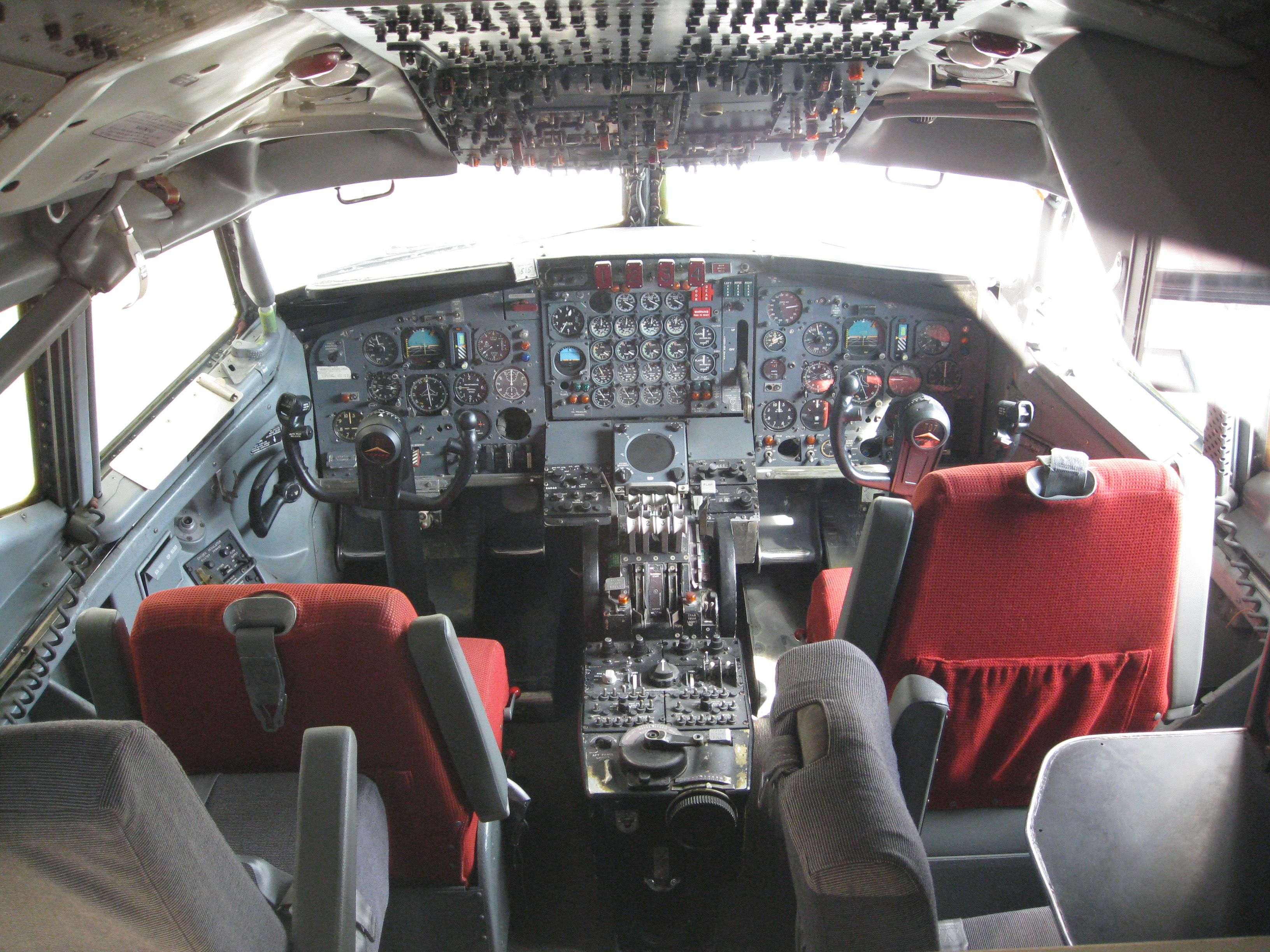 Cockpit of a Boeing 707-123 B (1959), Deutsches Museum München, Germany